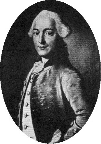 Jürgen Ernst Scheel (auch: Jürgen Erik von Scheel, dänisch: Jørgen Erik Skeel) (* 4. Februar 1737 auf Schloss Nordborg; † 11. Januar 1795 in Kopenhagen) war ein königlich dänischer Premierminister, Träger des Elefanten-Ordens und Landrat der Herrschaft Pinneberg.